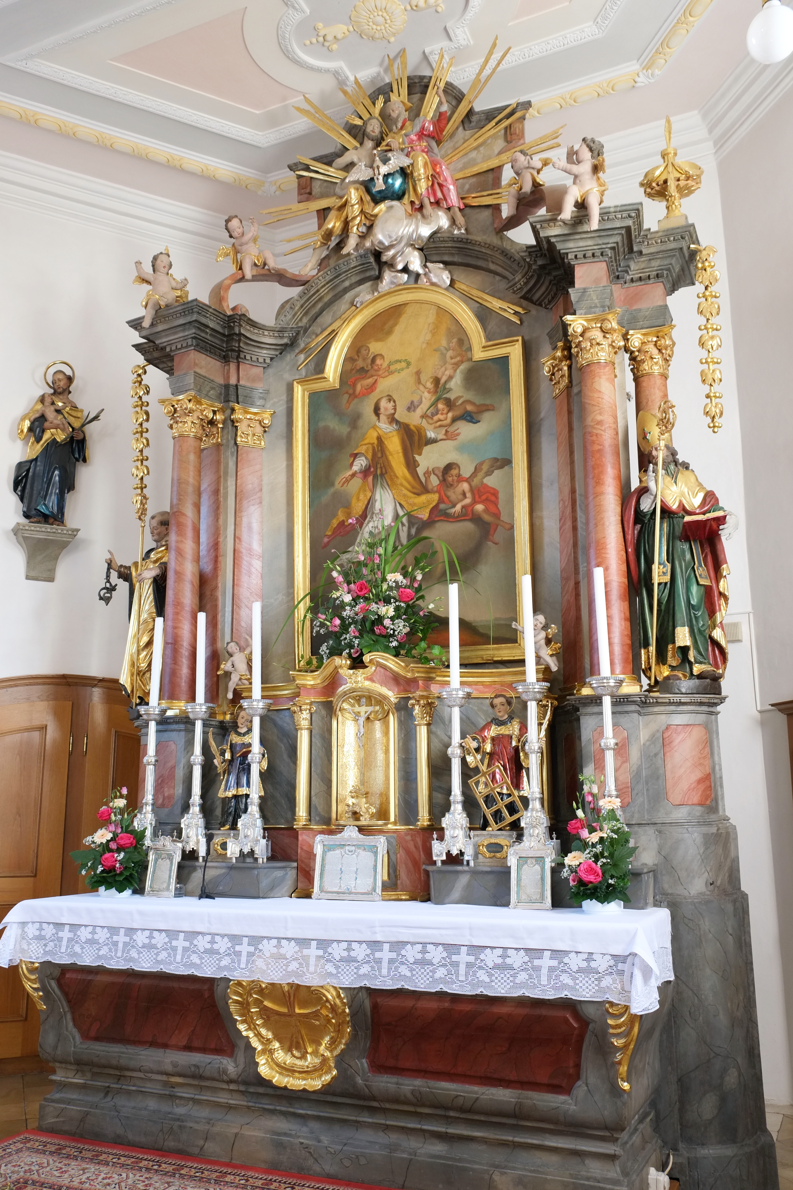 Kirche St. Stephan in Gallenbach, einem Stadtteil von Aichach im Landkreis Aichach-Friedberg (Bayern, Deutschland)